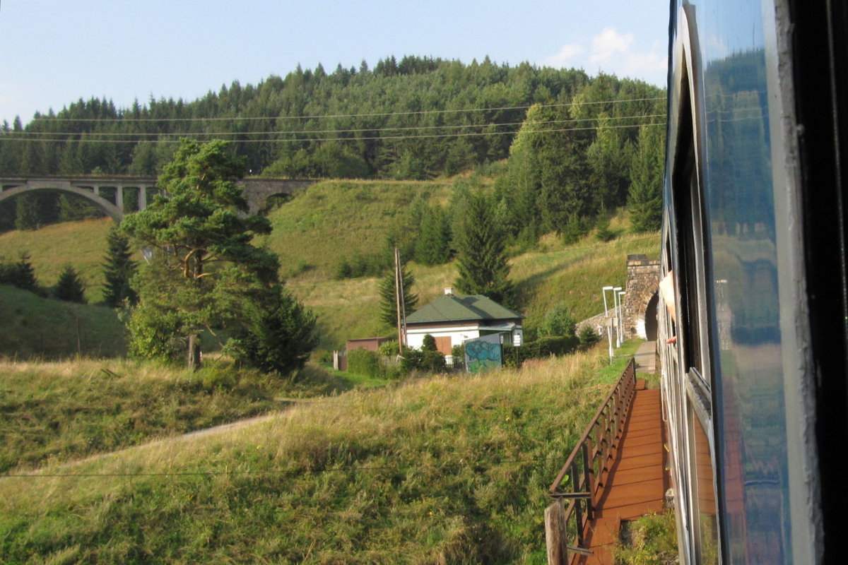 Ausfahrt des Rychlik Horehronec aus dem Telgart Tunnel